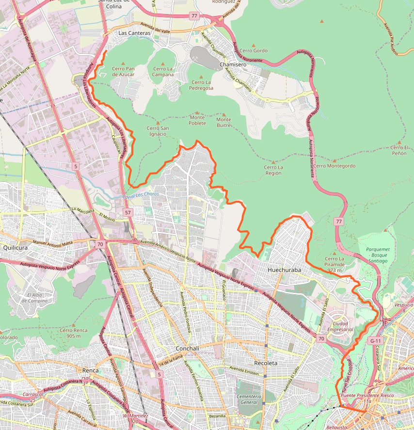 El Canal El Carmen, en Santiago de Chile, es la continuación del Canal San Carlos tras atravesar el río Mapocho y fluye con dirección general noroeste bordeando las últimas estribaciones de la cordillera de los Andes.